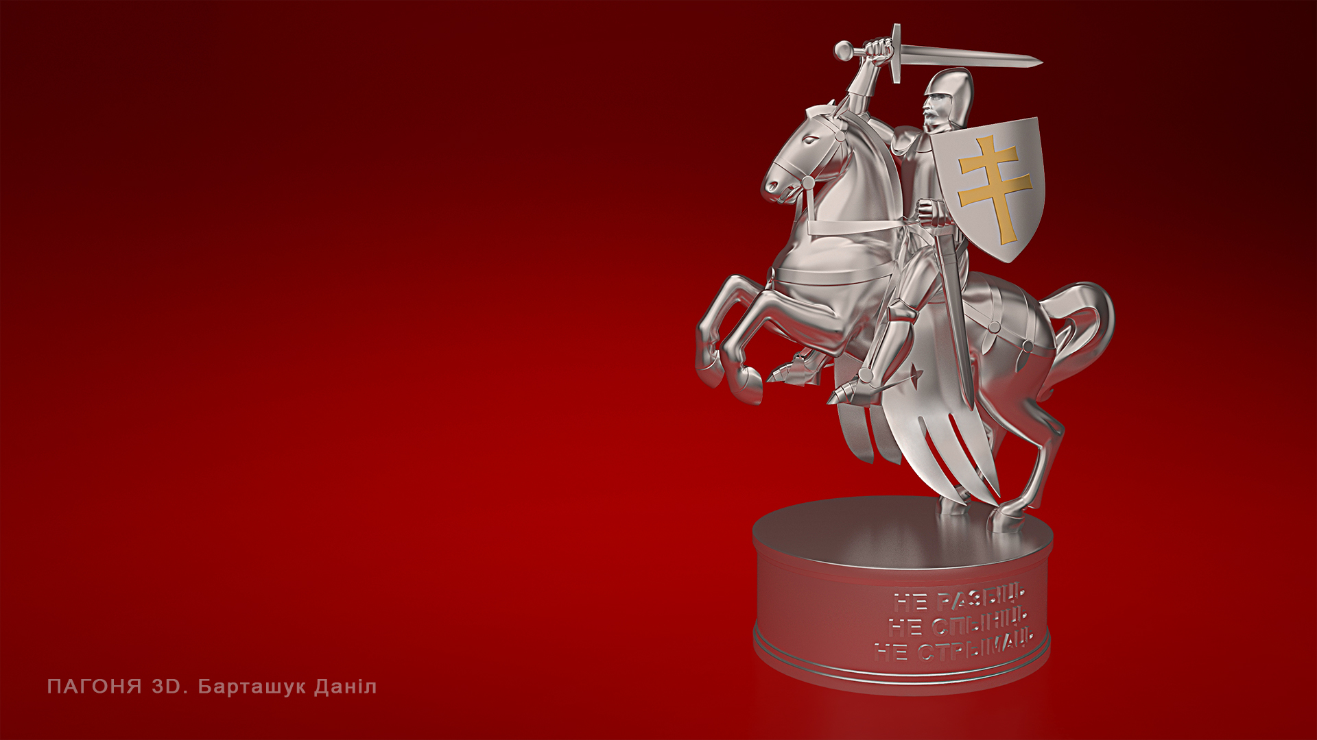 Аб'ёмная Пагоня. Барташук Д.